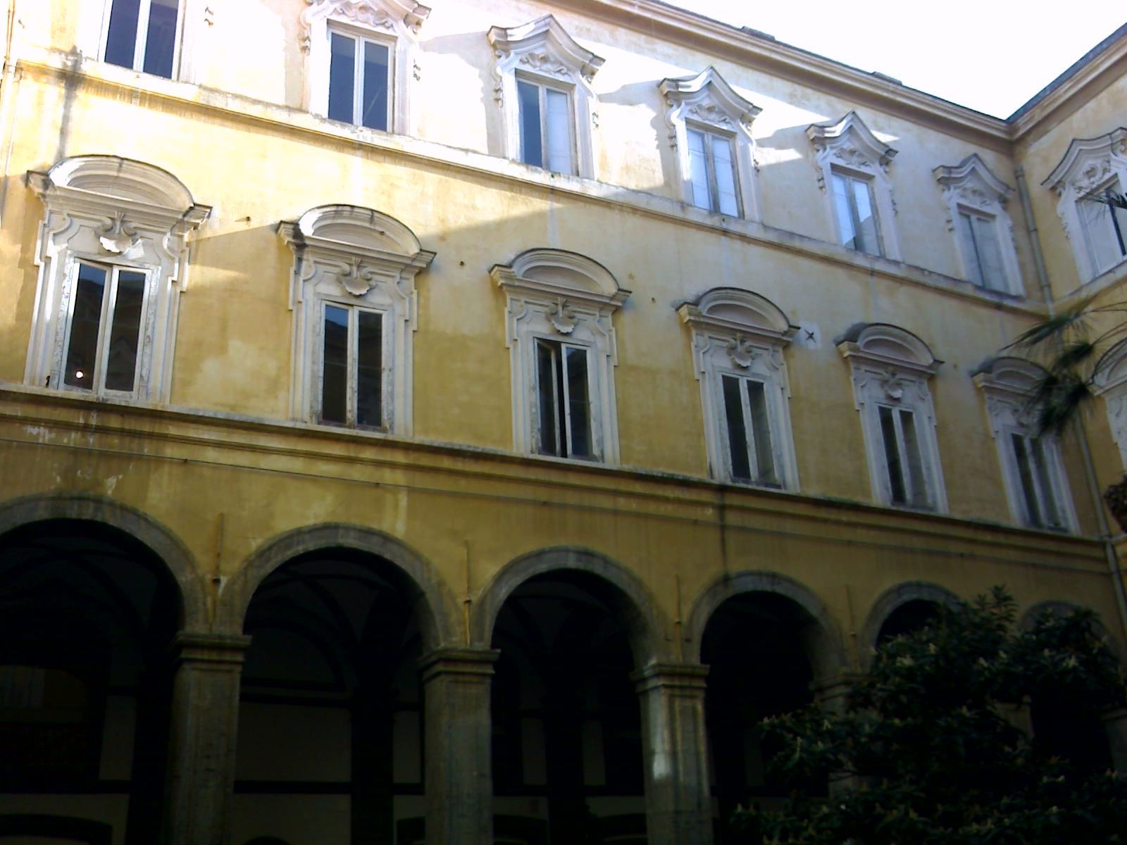 Chiostro piccolo del conservatorio di San Pietro a Majella (Napoli)